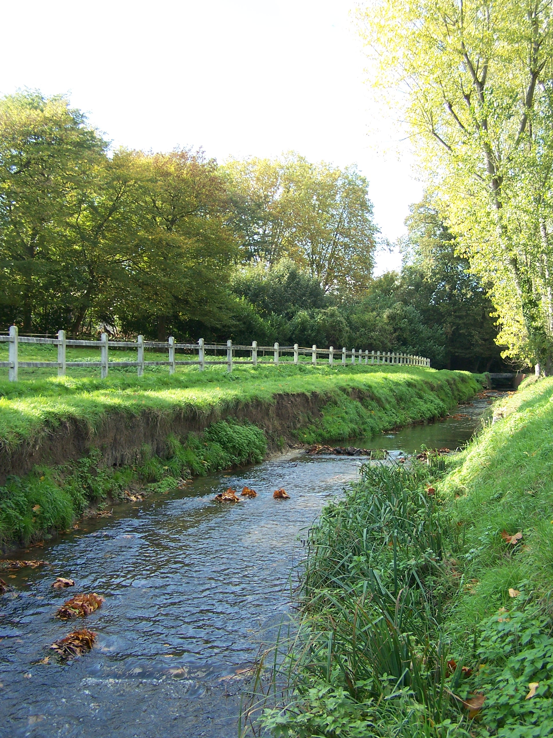 La rivière Bièvre à Jouy-en-Josas (Yvelines, France)